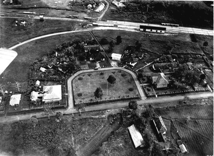 Foto. Luchtfoto van een onderneming en een spoorweg in de Lampongse Districten op Zuid-Sumatra.